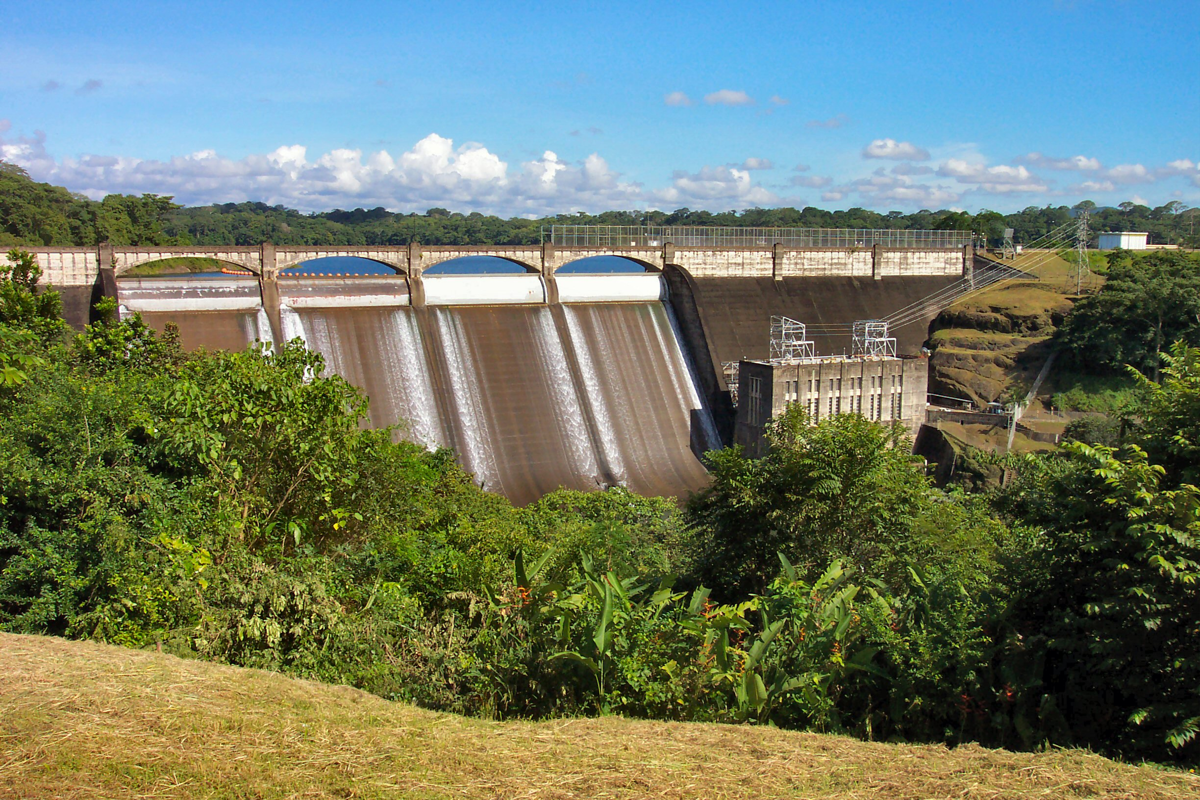 Madden Dam